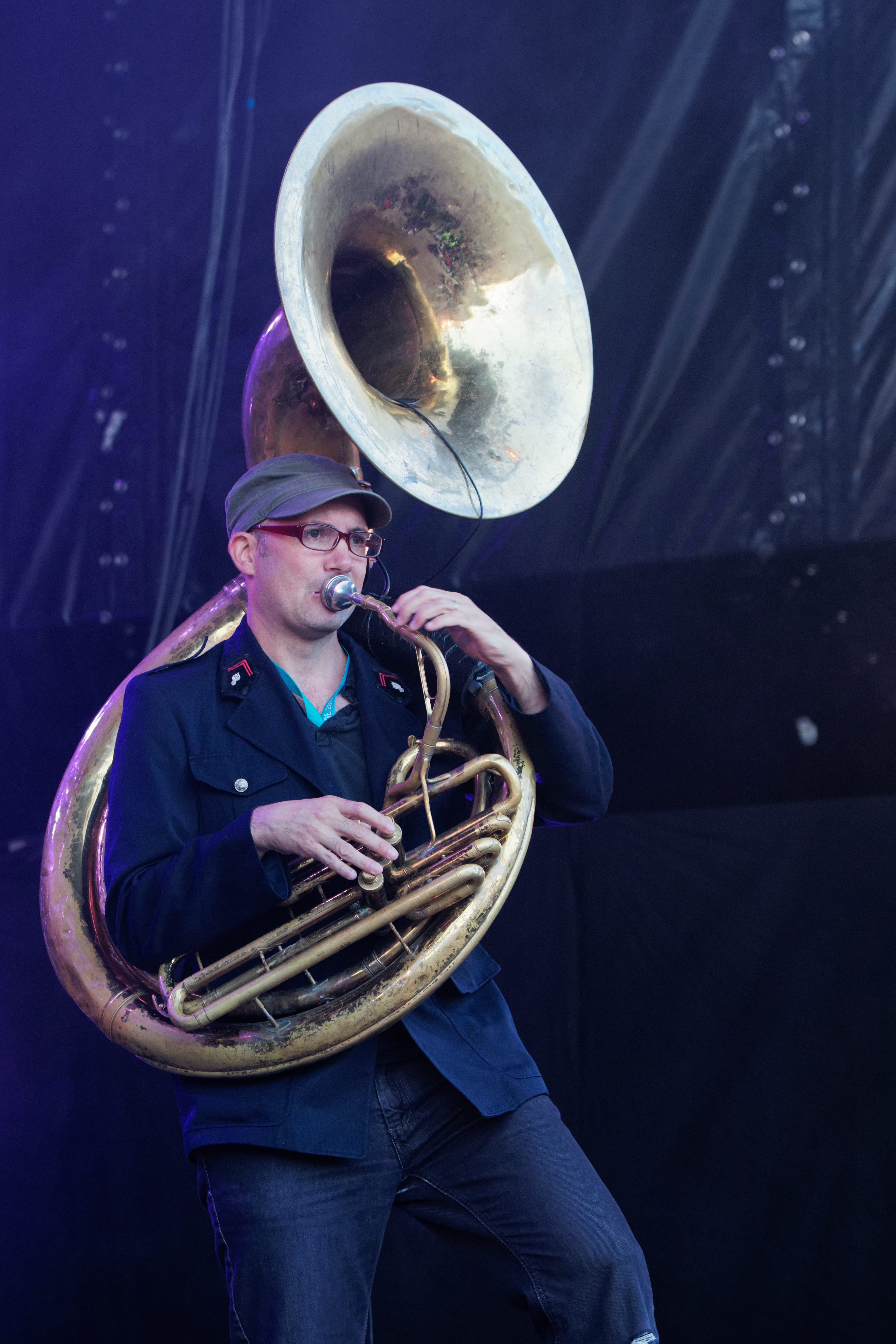 Delgrès en concert sur la scène Kermarrec lors du festival du Bout du Monde 2017 à Crozon dans le Finistère (France).